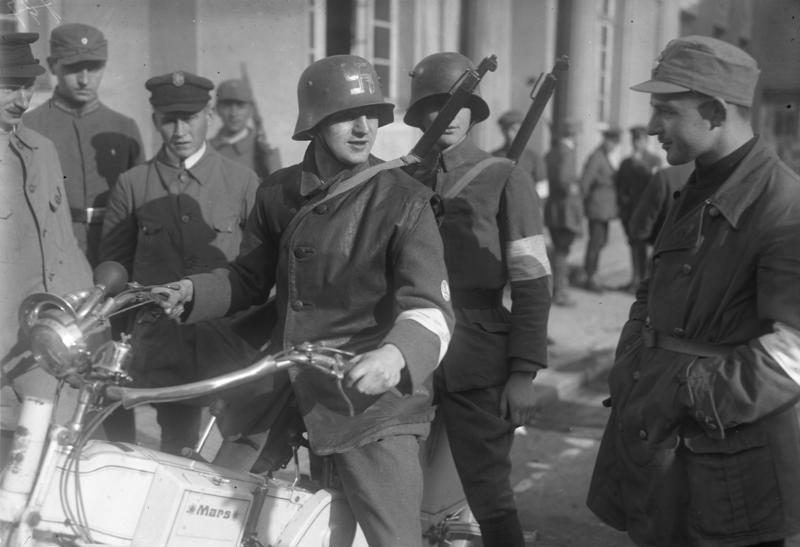 Zu dem Verbot der S.A. der "Privat Armee" Adolf Hitlers! Erinnerungen an den Hitler - Putsch im Jahre 1923. Bewaffnete S.A. Motorradfahrer - Patrouille mit dem Hakenkreuz am Stahlhelm in Neustadt auf Patrouillenfahrt.